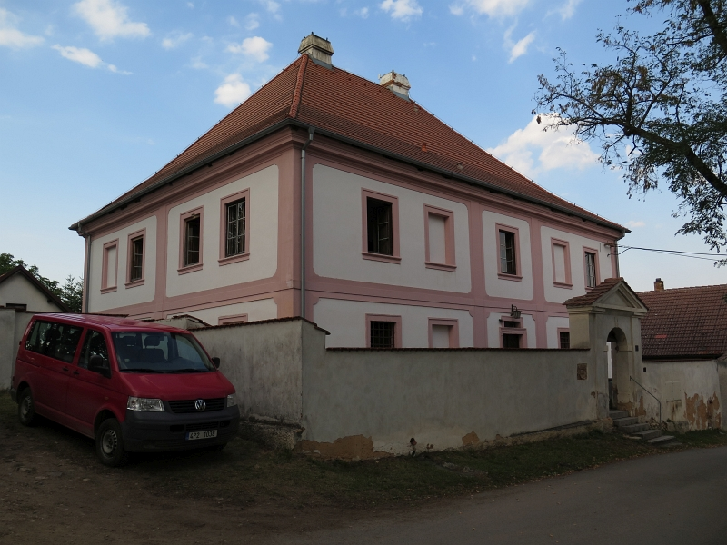 Fara, Prusiny 36, Nebílovy.